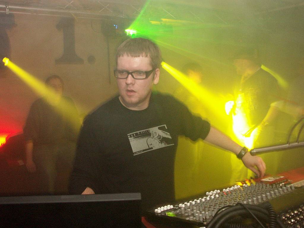 Minolta DSC Alexander Kowalski